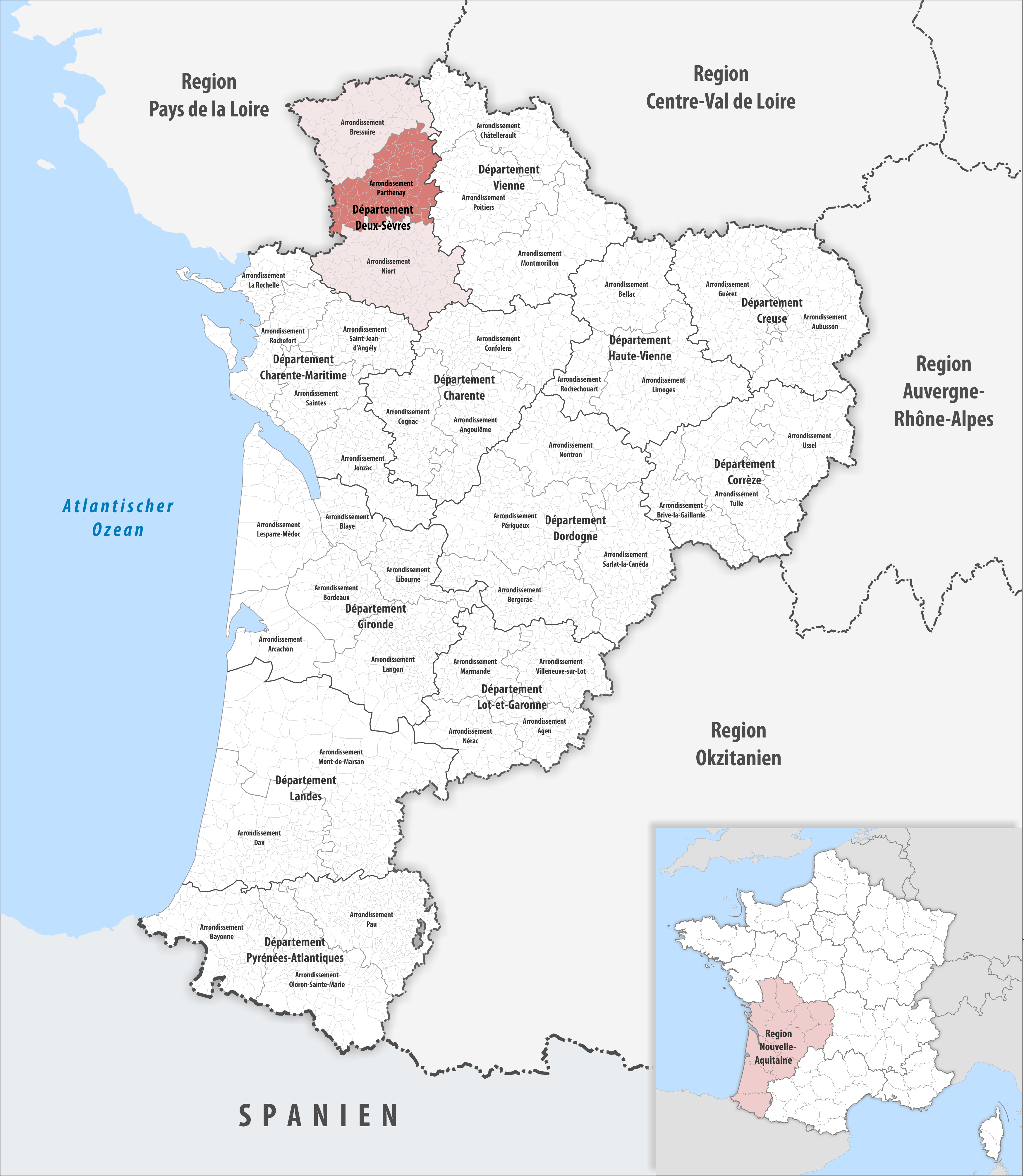 Lage des Arrondissements Parthenay